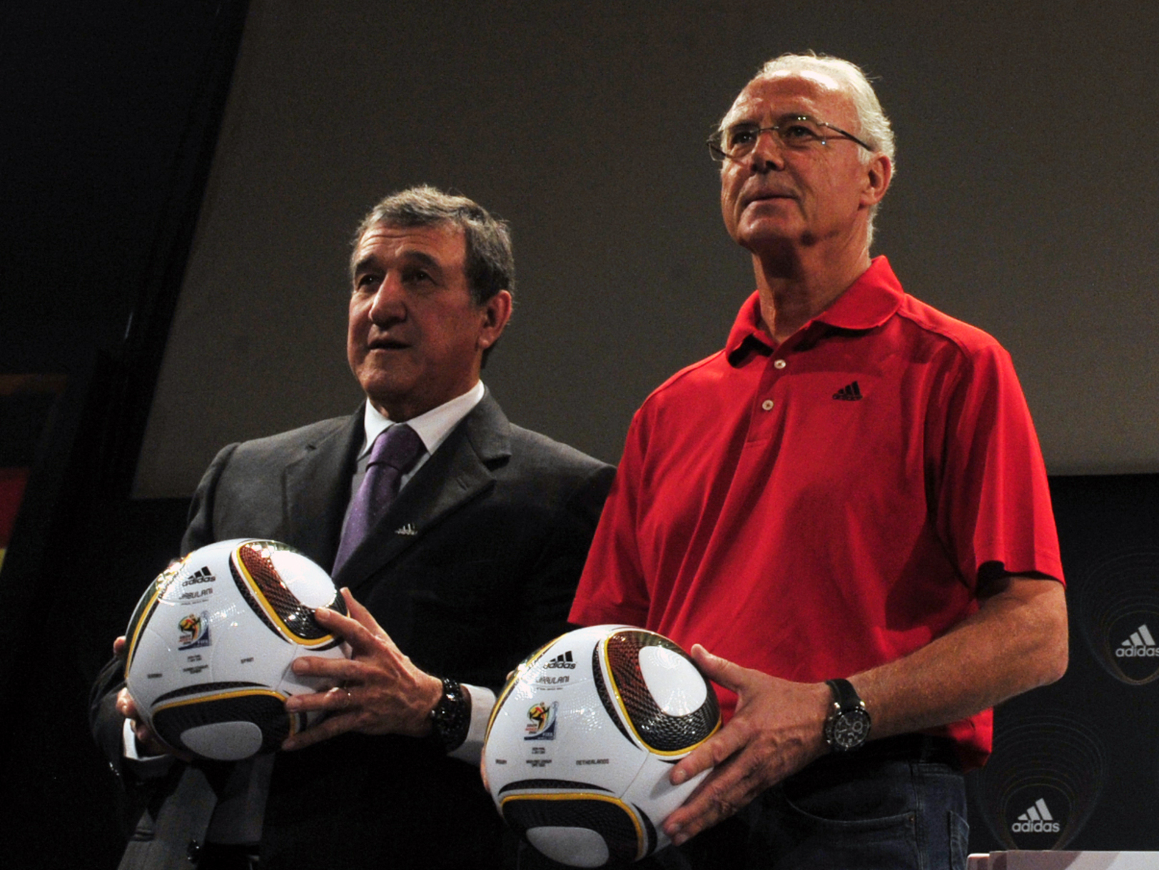 Joanesburgo (África do Sul) - O técnico da África do Sul Carlos Alberto Parreira e o ex-jogador alemão Franz Beckenbauer apresentam as bolas com os nomes dos times que jogarão a semifinal da Copa do Mundo.